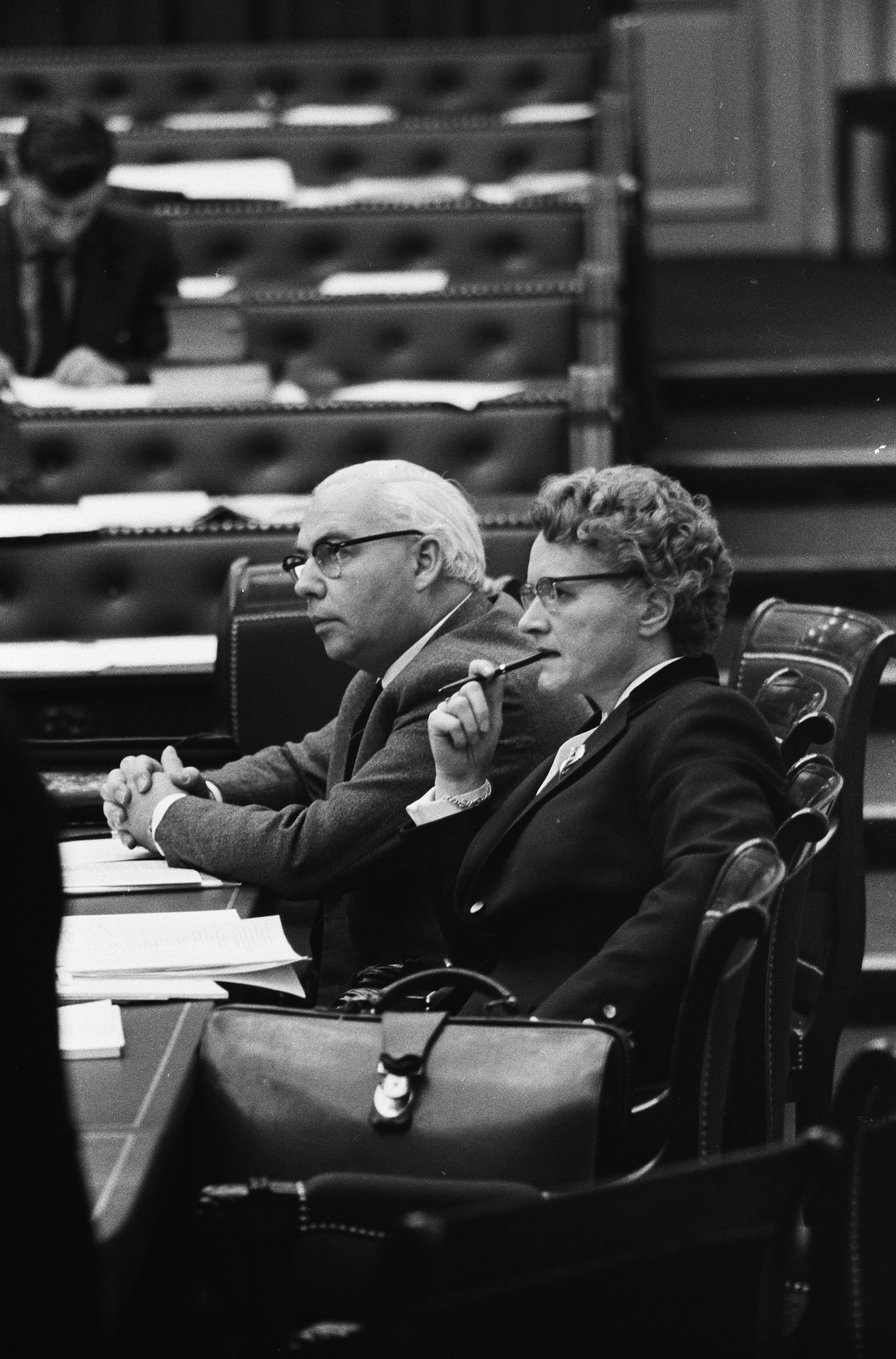 Collectie / Archief : Fotocollectie Anefo Reportage / Serie : [ onbekend ] Beschrijving : Behandeling Algemene Bijstandswet in Tweede Kamer. Achter de regeringstafel minister Klompé en minister Veldkamp Datum : 2 april 1963 Locatie : Den Haag, Zuid-Holland Trefwoorden : bijstand, ministers, parlementaire debatten, sociaal beleid Persoonsnaam : Klompé, Marga, Veldkamp, G.M.J. Fotograaf : Pot, Harry / Anefo Auteursrechthebbende : Nationaal Archief Materiaalsoort : Negatief (zwart/wit) Nummer archiefinventaris : bekijk toegang 2.24.01.05 Bestanddeelnummer : 914-9964